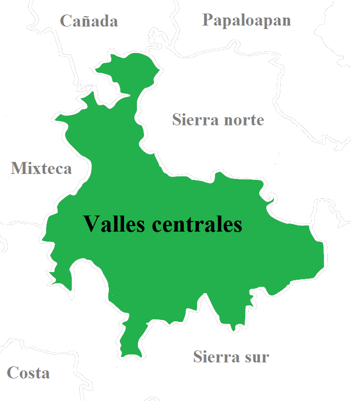 Región Valles Centrales, una de las ocho regiones que conforman al estado mexicano de Oaxaca.